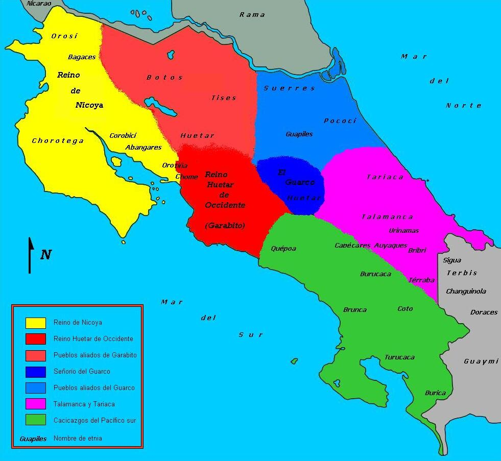 Mapa de las sociedades autóctonas costarricenses del siglo XVI a la llegada de los españoles (1502), según el mapa elaborado por Mario Porras y Laura Sancho en 1998, publicado en el libro de Ana María Botey Sobrado (2002): Costa Rica: de las sociedades autóctonas hasta 1914, Editorial de la UCR, p.71, ISBN 9977-67-694-1.